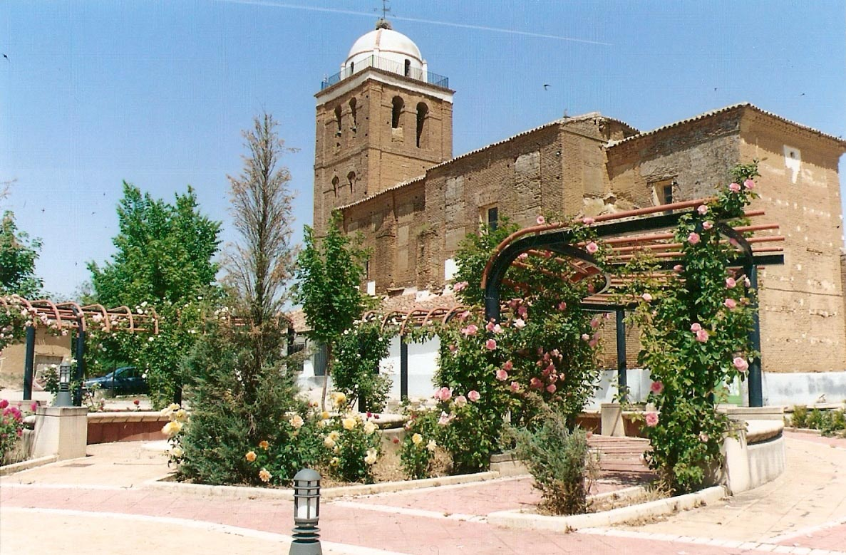 Vista de la plaza de San Román con la iglesia al fondo